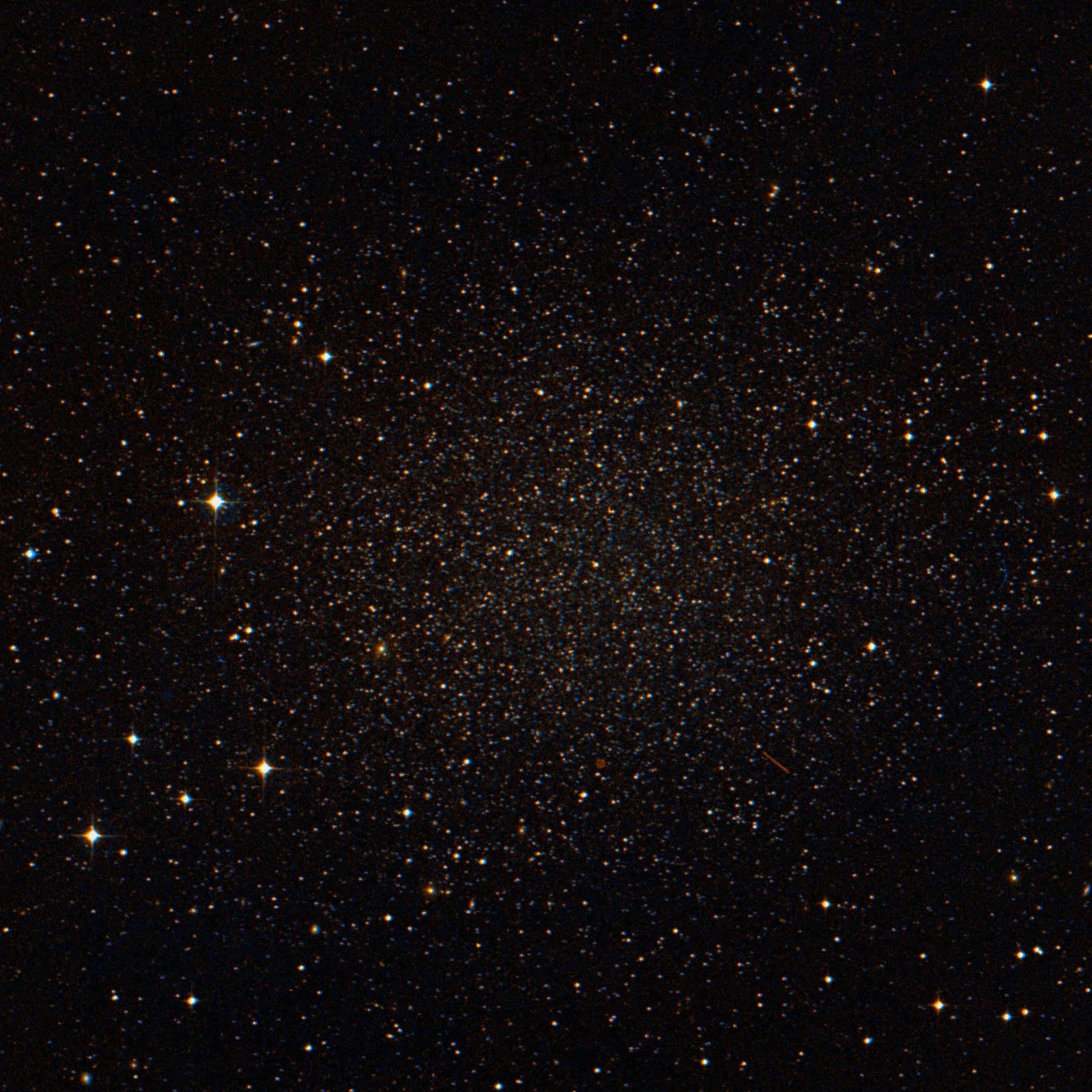 Карликовая галактика в созвездии Скульптор